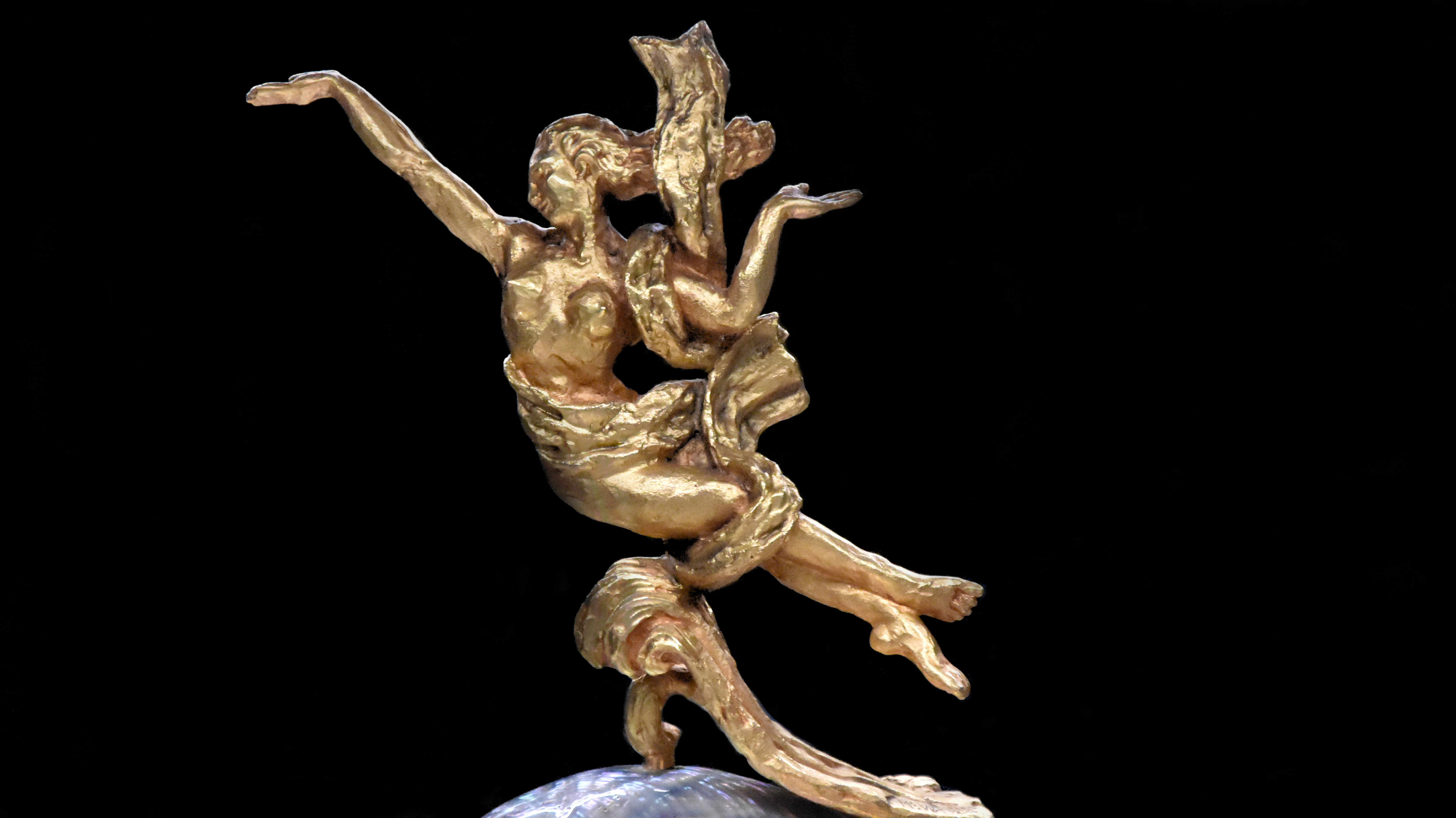 Ondine (tafelmiddenstuk) DIVA 27-12-2018